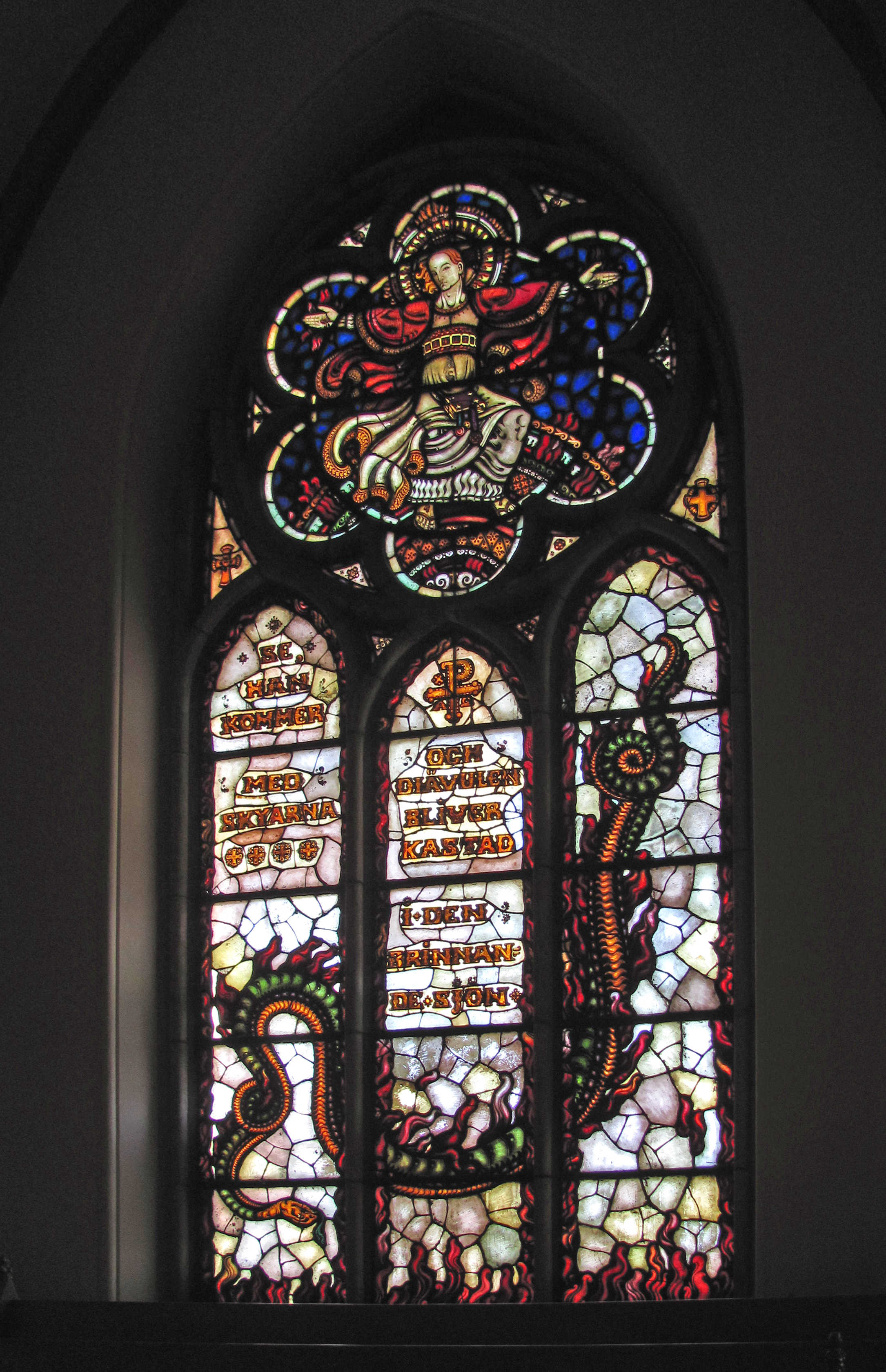 Oscarskyrka, fönster